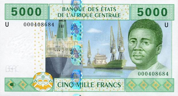 Купюра в 5000 франков КФА. Лицевая сторона